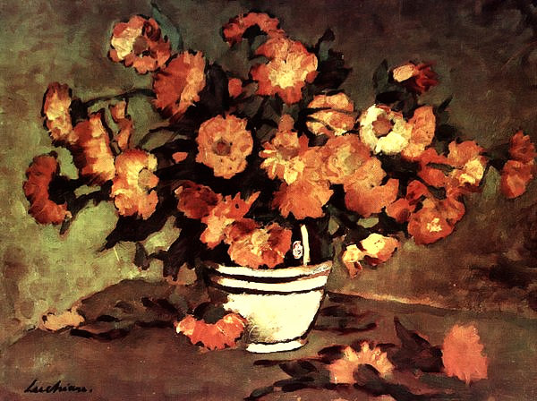 Gălbenele - Pot marigold